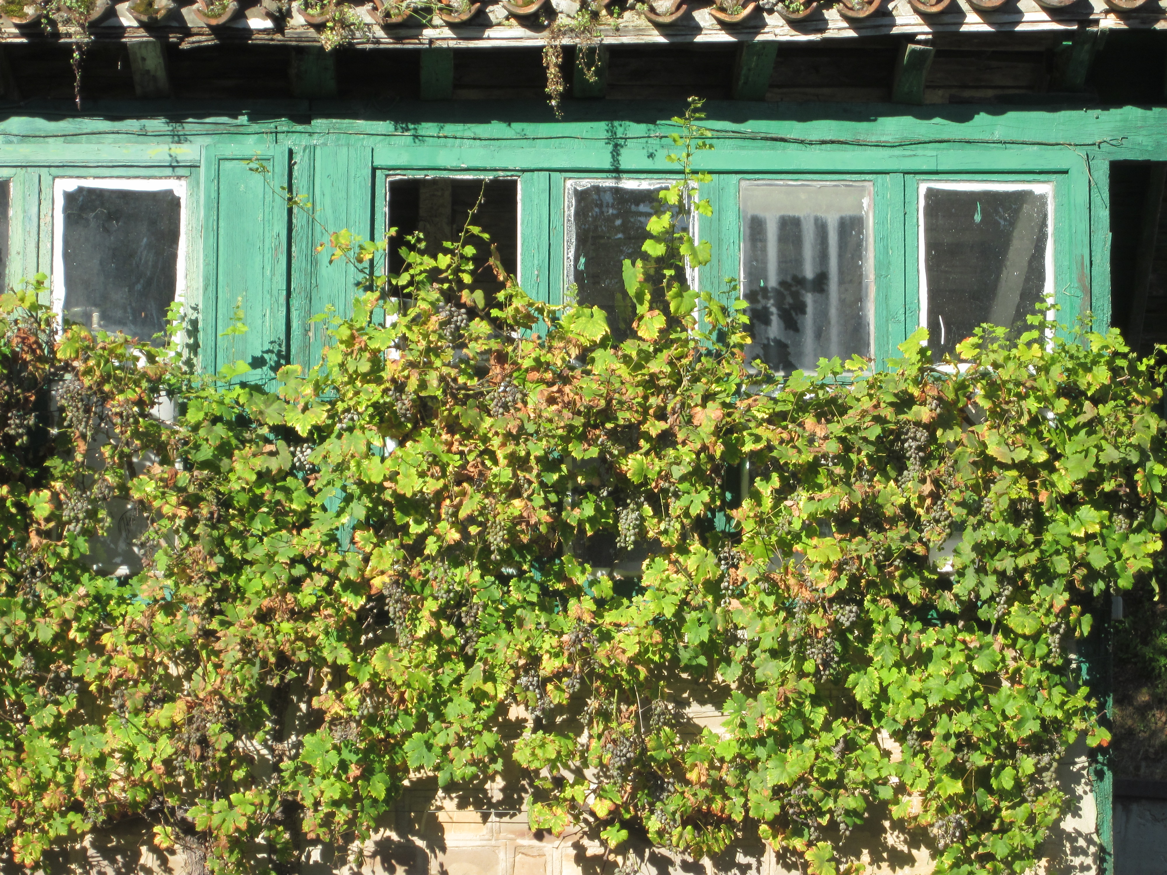 Uliako Lore Baratzak